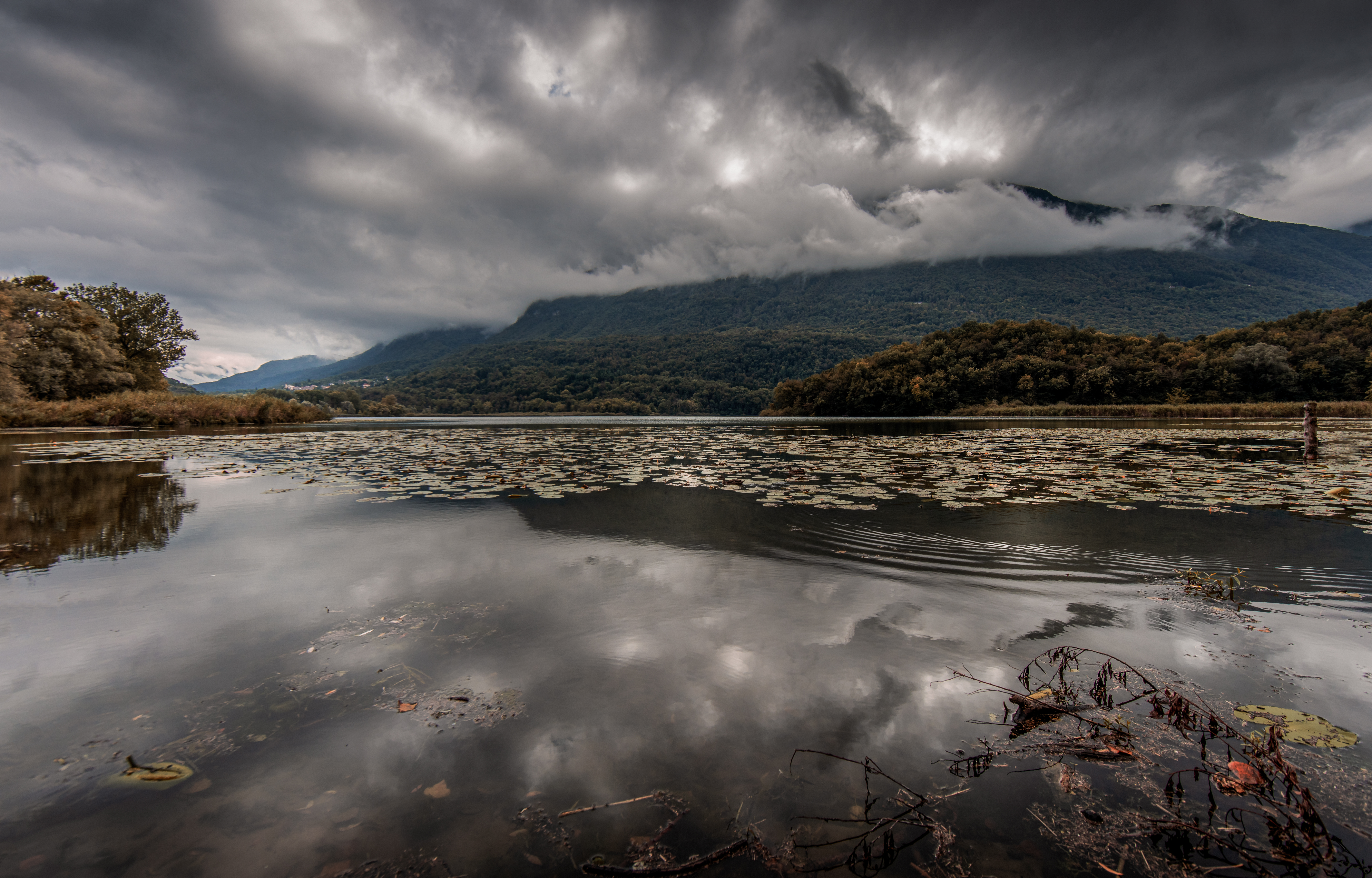 riserva naturale Lago di Piano This is a photo of a monument which is part of cultural heritage of Italy.